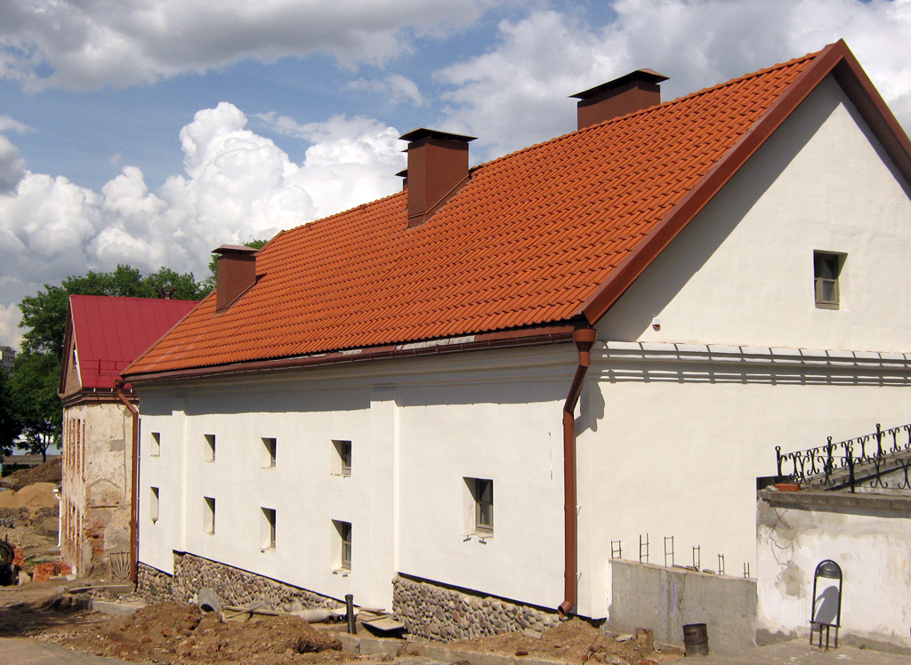 Мінск. Вуліца Герцэна, 8